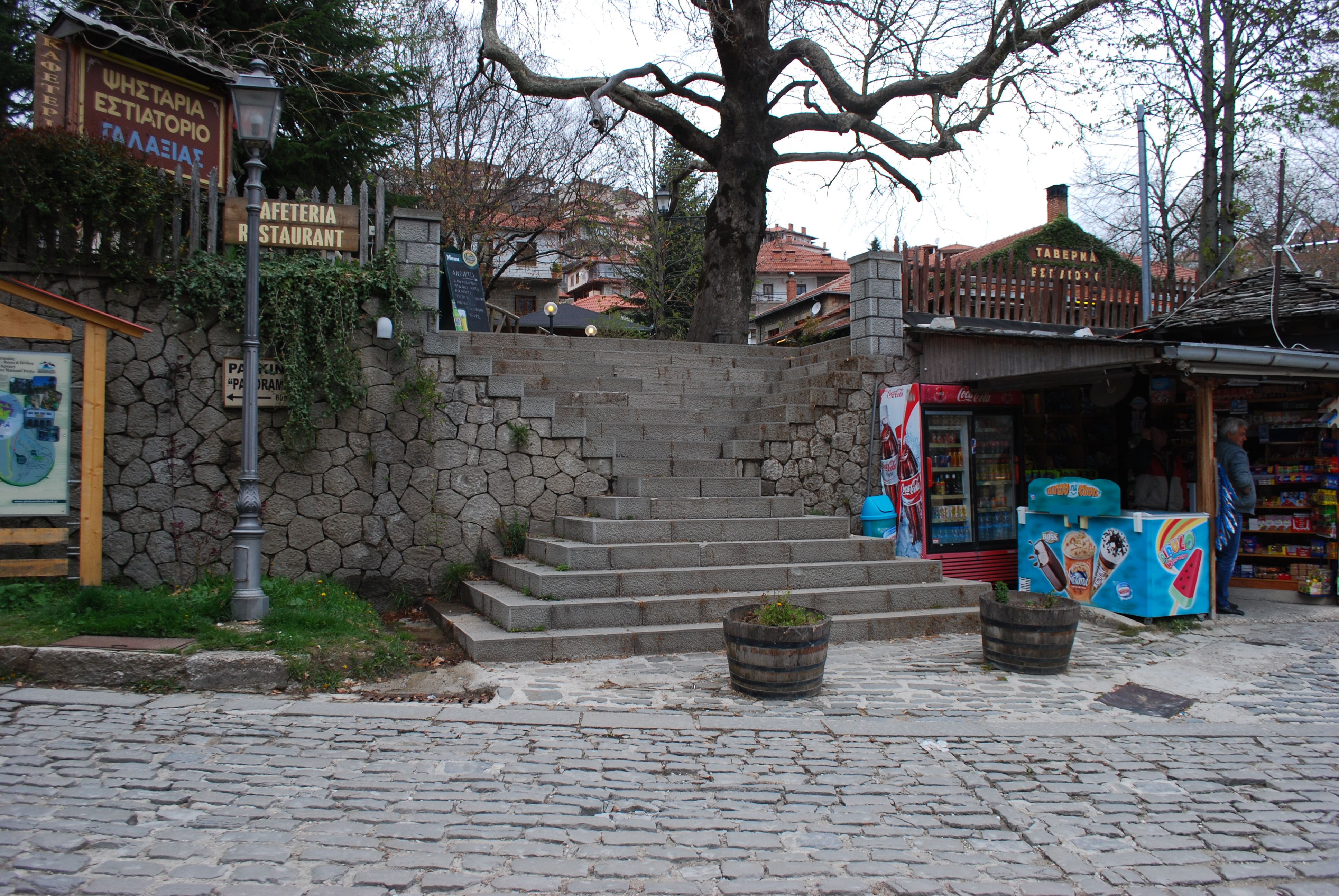 Vue de Metsovo.